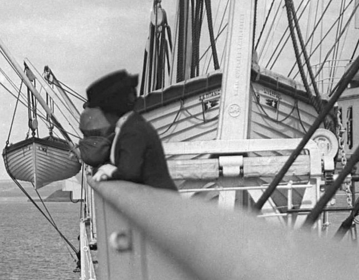 Фрагмент фотографии, сделанной с верхней палубы. В кадре шлюпки носовой части левого борта Титаника. За борт свисает шлюпка №2.